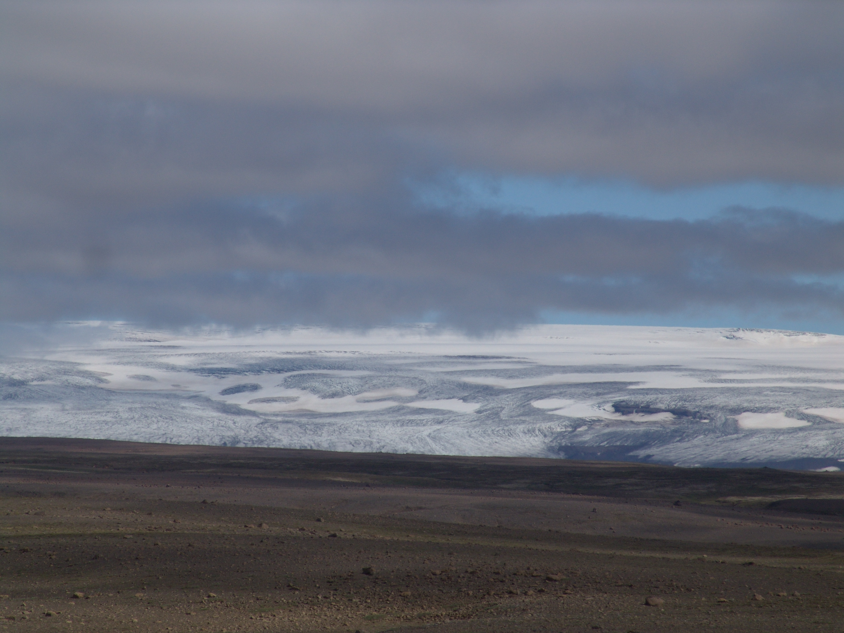 Island, Landschaft.